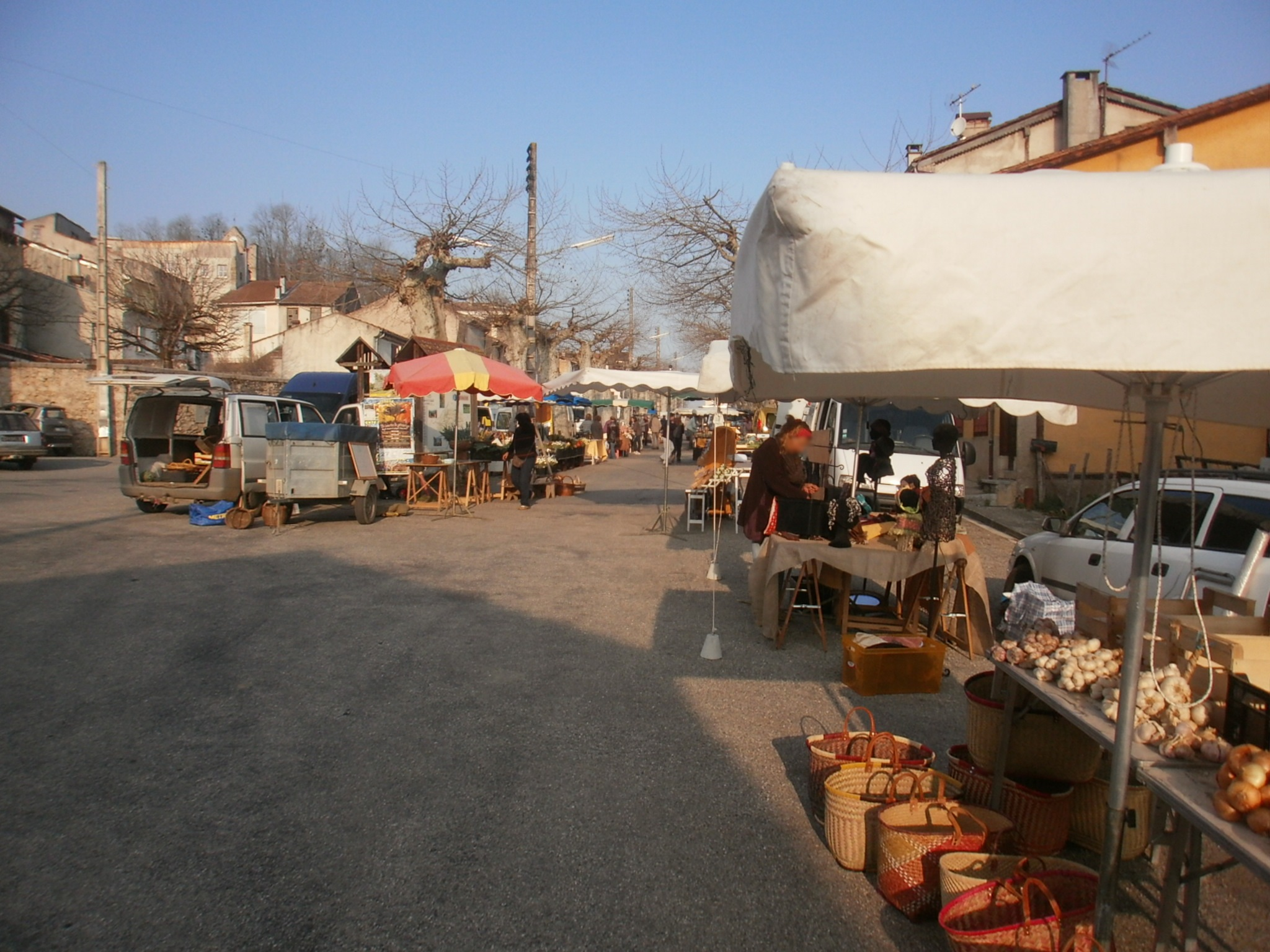 Marché du jeudi matin à La Bastide-de-Sérou (Ariège, France).